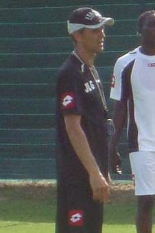 Jean-Louis Garcia (à gauche) à l'entrainement du SCO le 2 juillet 2009. De gauche à droite : Jean-Louis Garcia, Matar Fall, Kevin Olimpa, Pierre Caillaud.